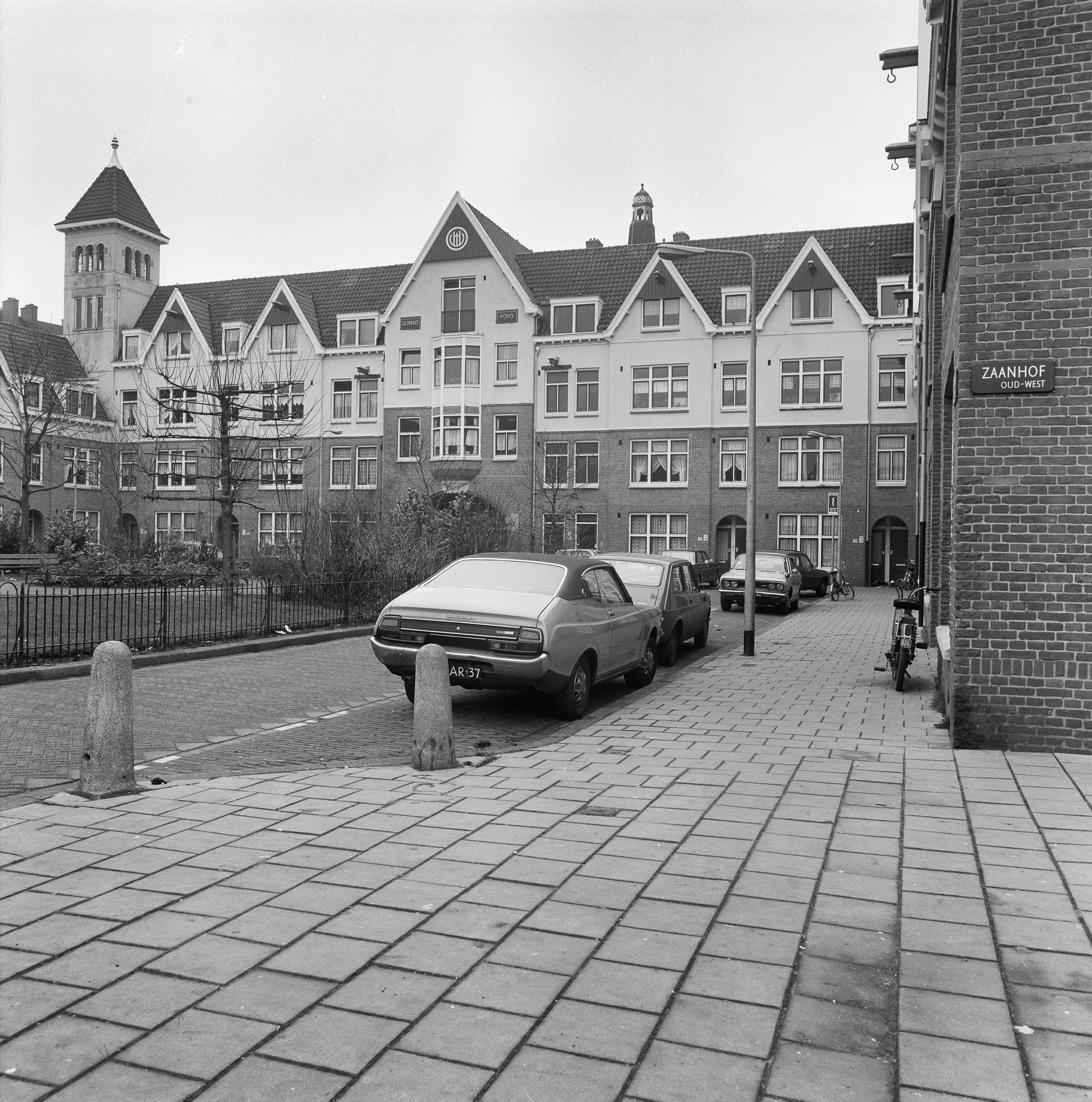 overzicht noord-zijde